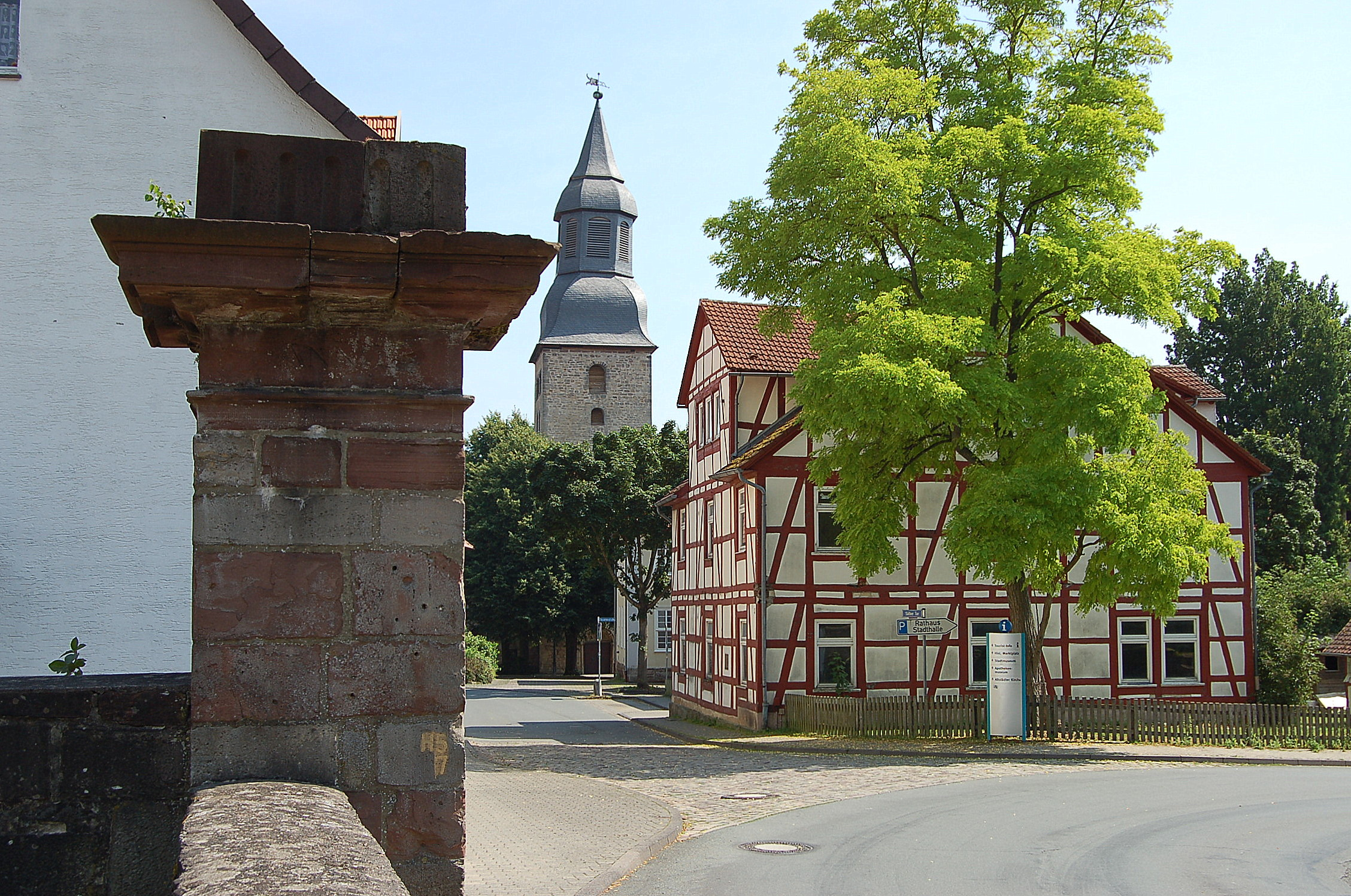 Nachfolgebau der ehemaligen Gaststätte „Zur Flötenlinde“ (rechts), Geburtshaus von Wilhelm Klinkerfues.